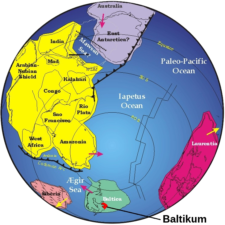 Position des Urkontinent Baltika mit dem heutigem Baltikum